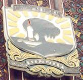 Emblem of the Andalas University on its gate’s wall, smaller size